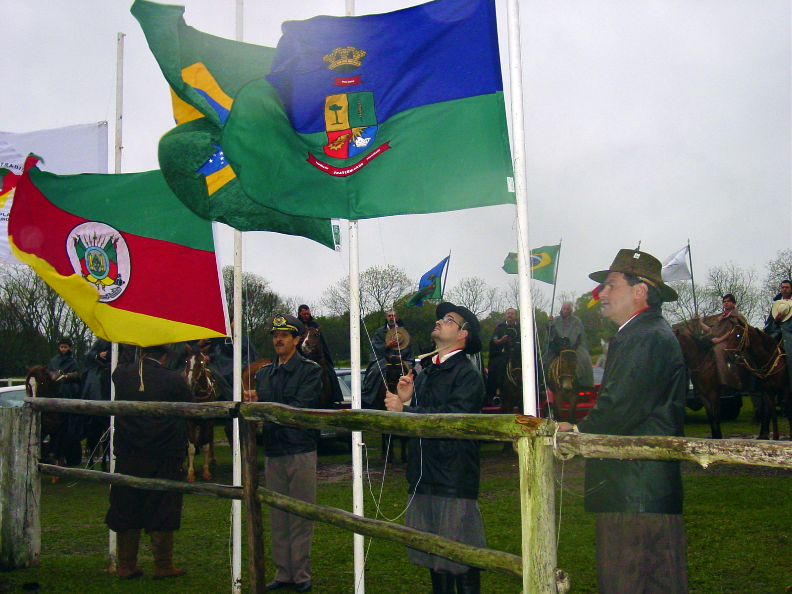 Bandeira do municipio de Passo Fundo ao lado dos pavilhoes do Brasil e do Ri Grande do Sul